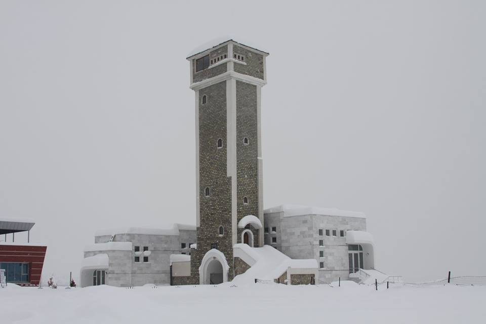 Qyteti nen madheshtine dhe bardhesine e bores,pamje e mrekullueshme e fokusuar nga sheshi Skederbej